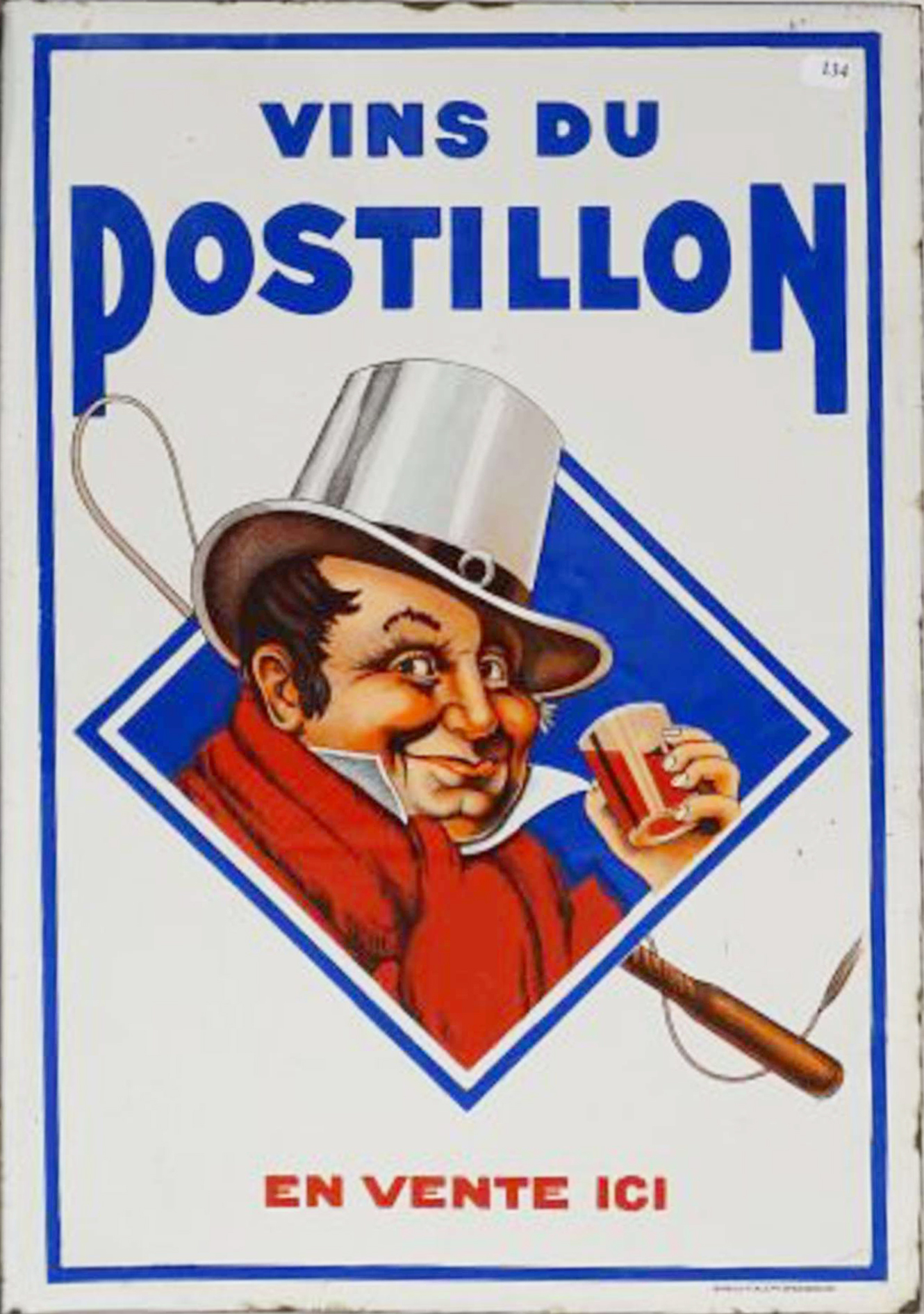 Réclame pour les "Vins du Postillon". Tôle émaillée. Vers 1910.